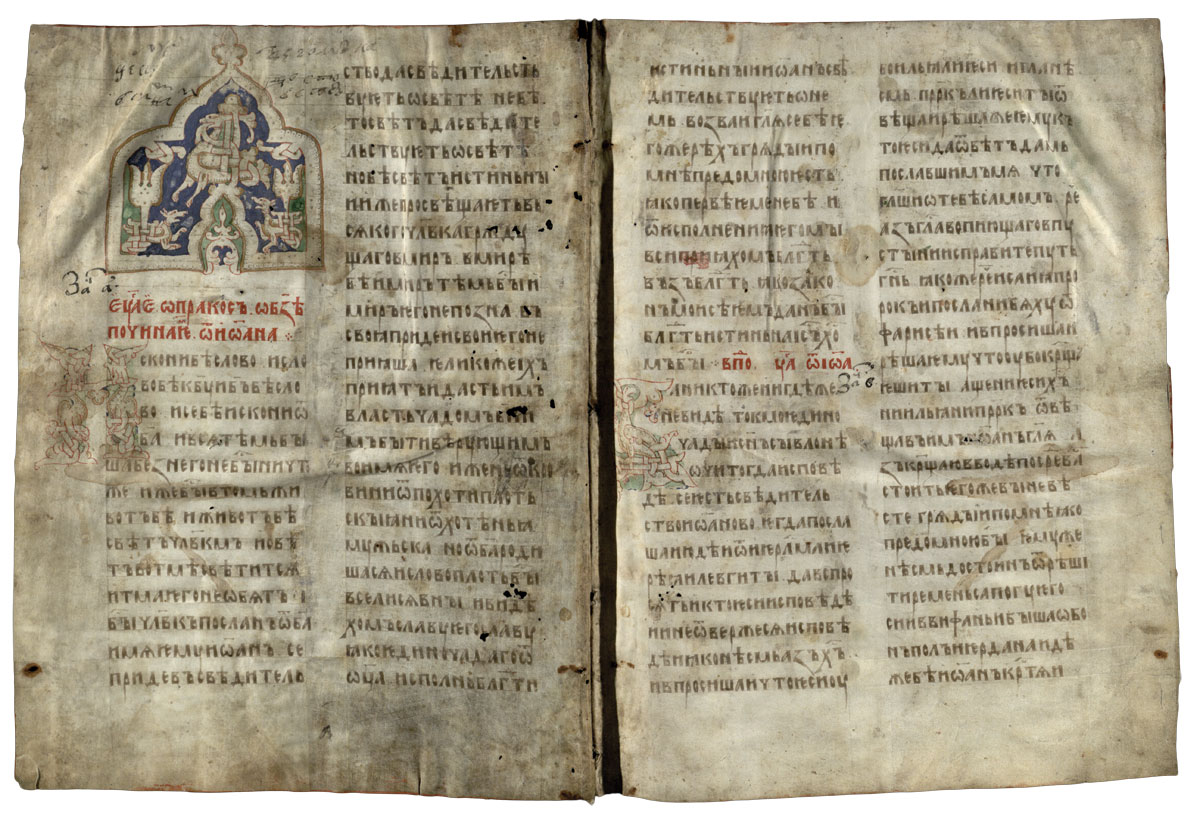 Беларуская (тарашкевіца): Мсьціскае Эвангельле (Mściskaje Evangielle)